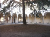 chiostro del liceo scientifico taramelli di pavia